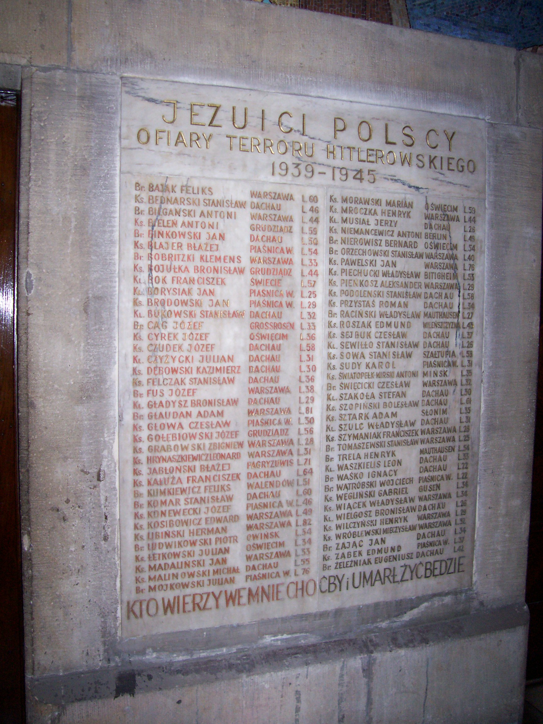 Kraków, kościół klasztorny jezuitów pw. Najświętszego Serca Pana Jezusa, 1909-1921